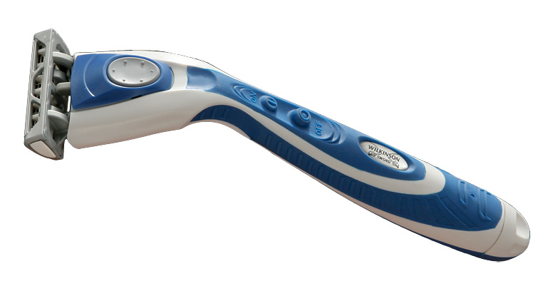 Quattro Titanium Energy, batteriebetriebener Nassrasierer der Firma Wilkinson Sword